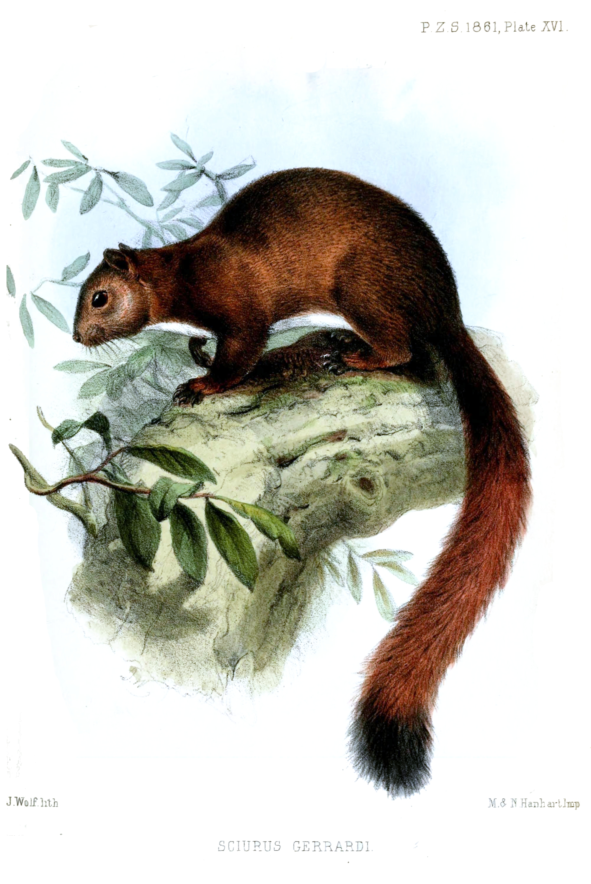 Sciurus gerrardi = S. granatensis gerrardi